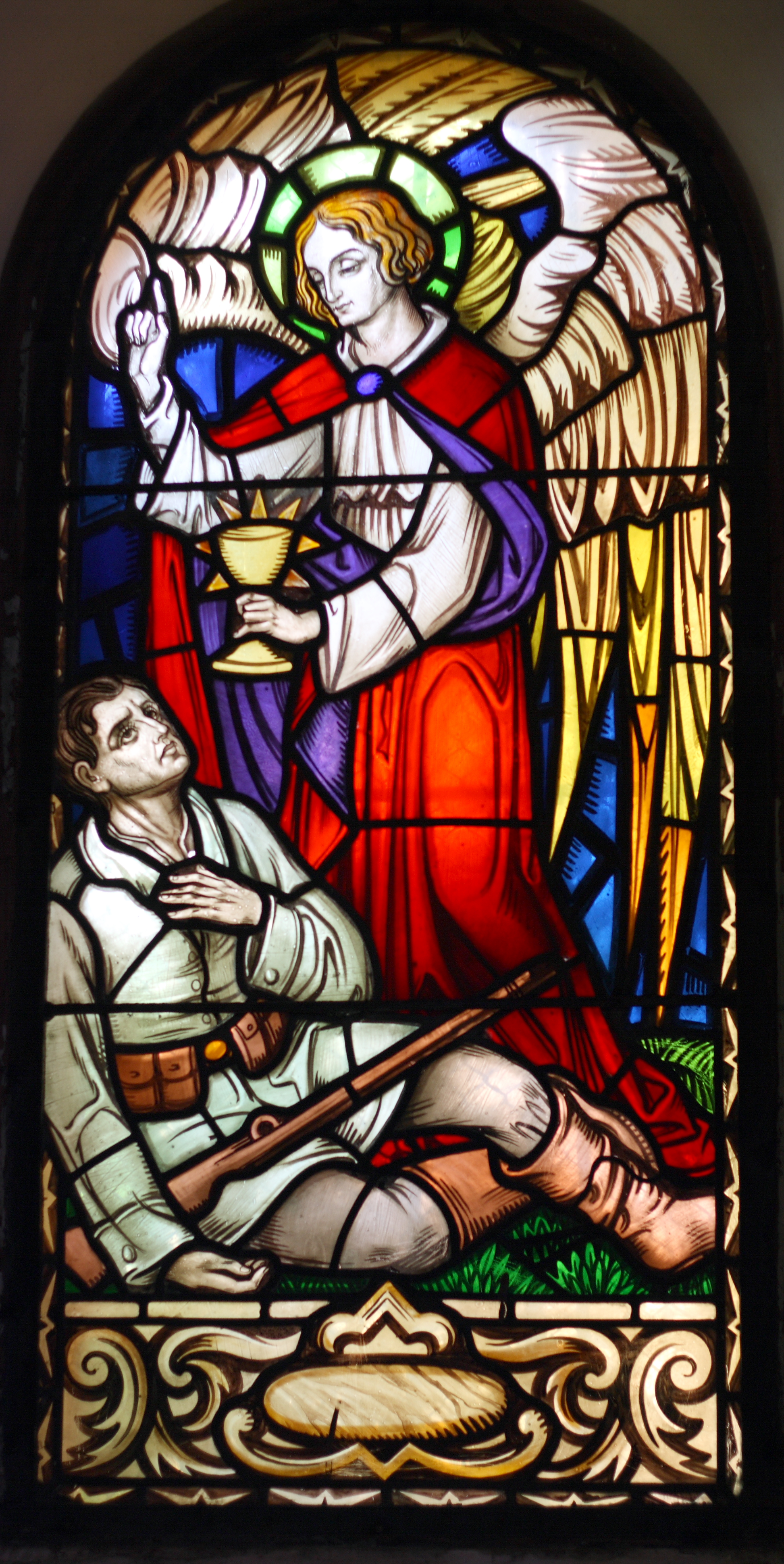 Bleiglasfenster („Kriegsfenster“) in der katholischen Pfarrkirche St. Martin in Hillesheim